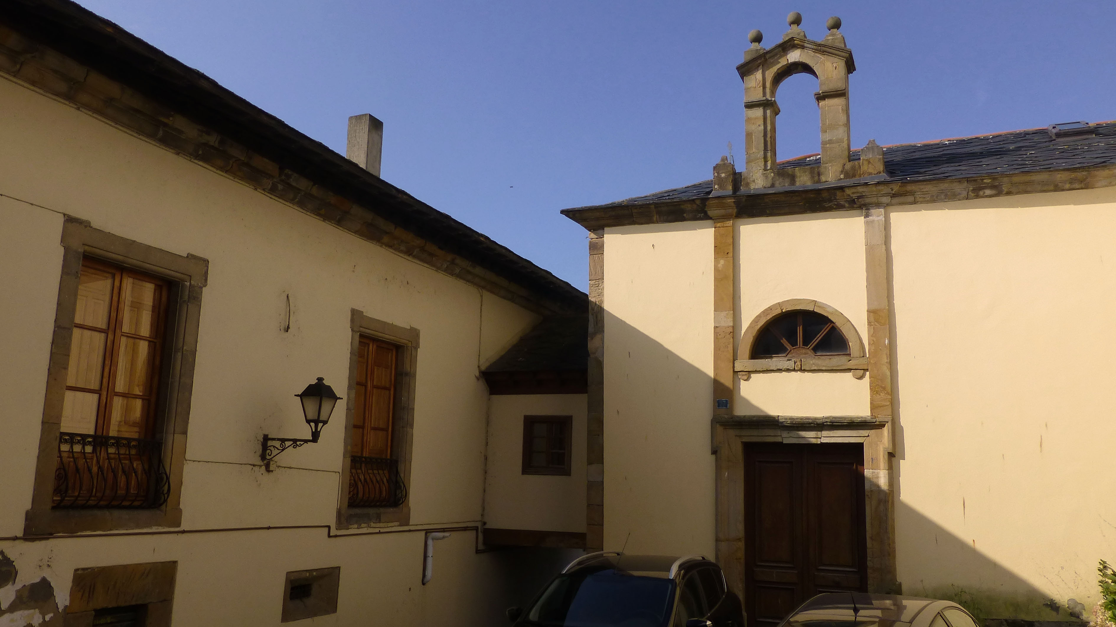 Palacio del Marqués de la Ferrera Palacio de la Moral